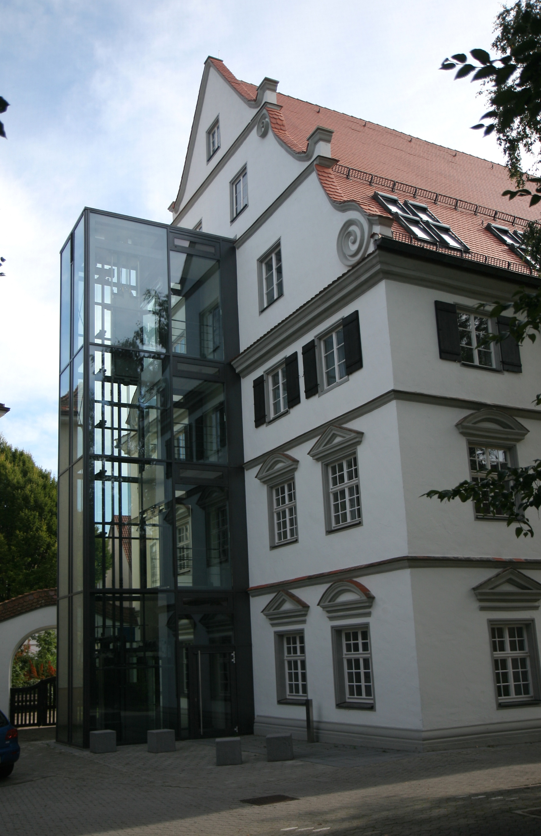 Amtsgericht Biberach an der Riß, Alter Postplatz 4 in Biberach an der Riß.